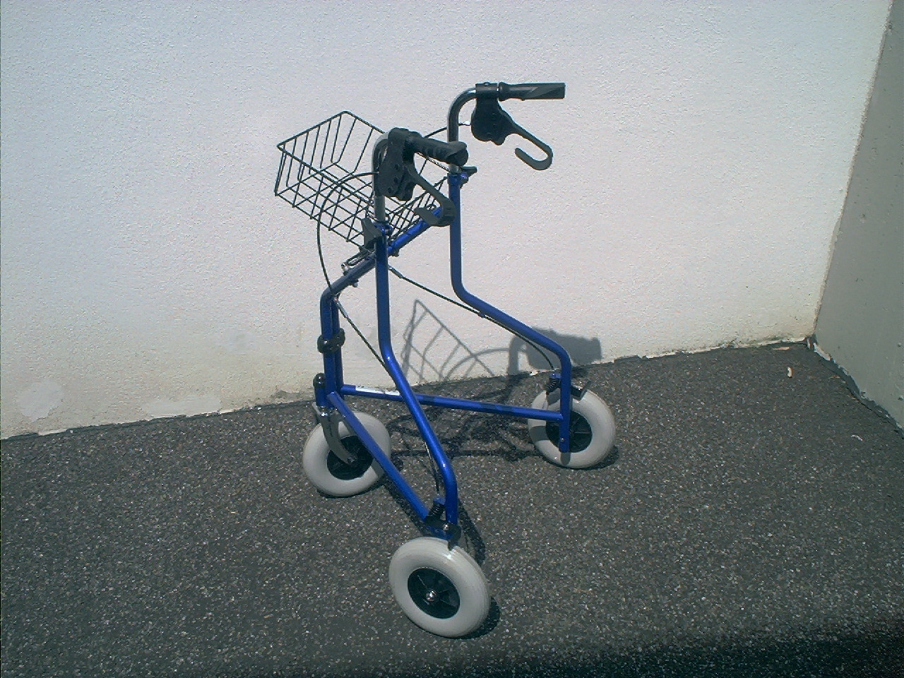 Beschreibung: Standard Delta Gehrad mit Einkaufskorb und 2 Parkbremsen, faltbar und Griffe höhenverstellbar Hersteller: Bischoff & Bischoff Model Delta B Quelle: selbst fotografiert Fotograf : Bestrossi Datum: August 2005